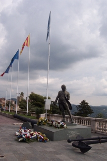 Monument en l'honneur de l'Amiral de Grasse, Place du Cours, à Grasse. Photo Personnelle de Utilisateur:Geoffrey06 prise le 21/09/2005.